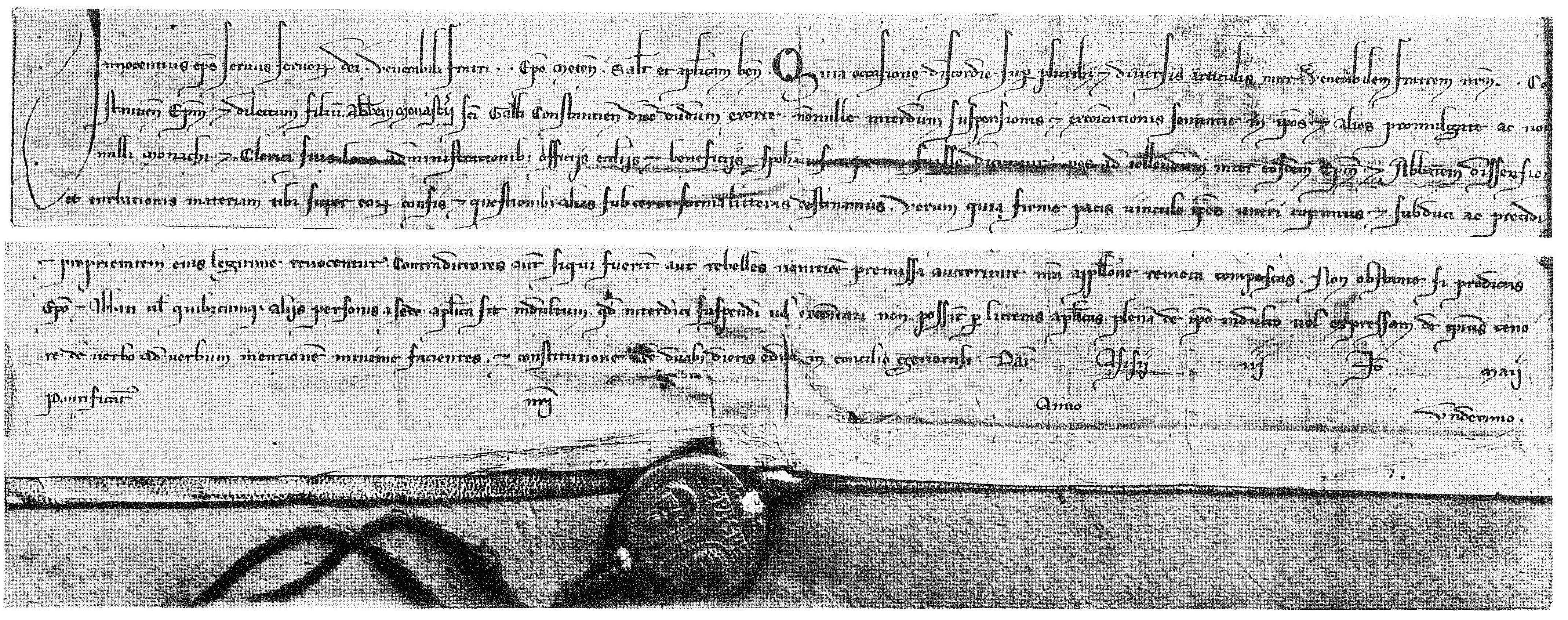 Litterae cum filo canapis di Innocenzo IV (1254), conservata allo Stiftsarchiv di San Gallo, da Franz Steffens, Paleographie latin, Champion, Parigi 1910, tav. 94, p. 376